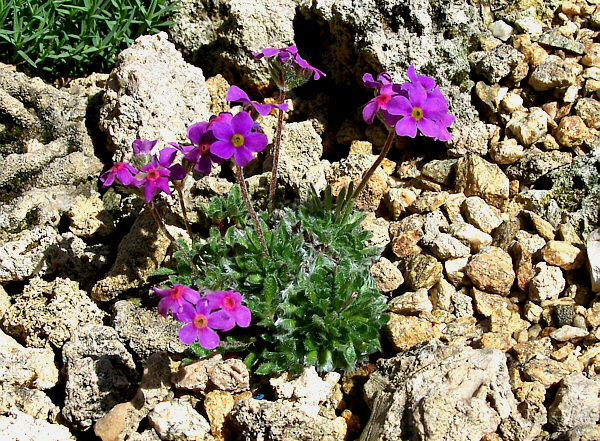 Androsace de l'ouest et centre Népal que l'on trouve sur des zones graveleuses ou sur pelouse claire, entre 3000 et 4900 m. Elle mesure de 3 à 6 cm. (Photo en culture)